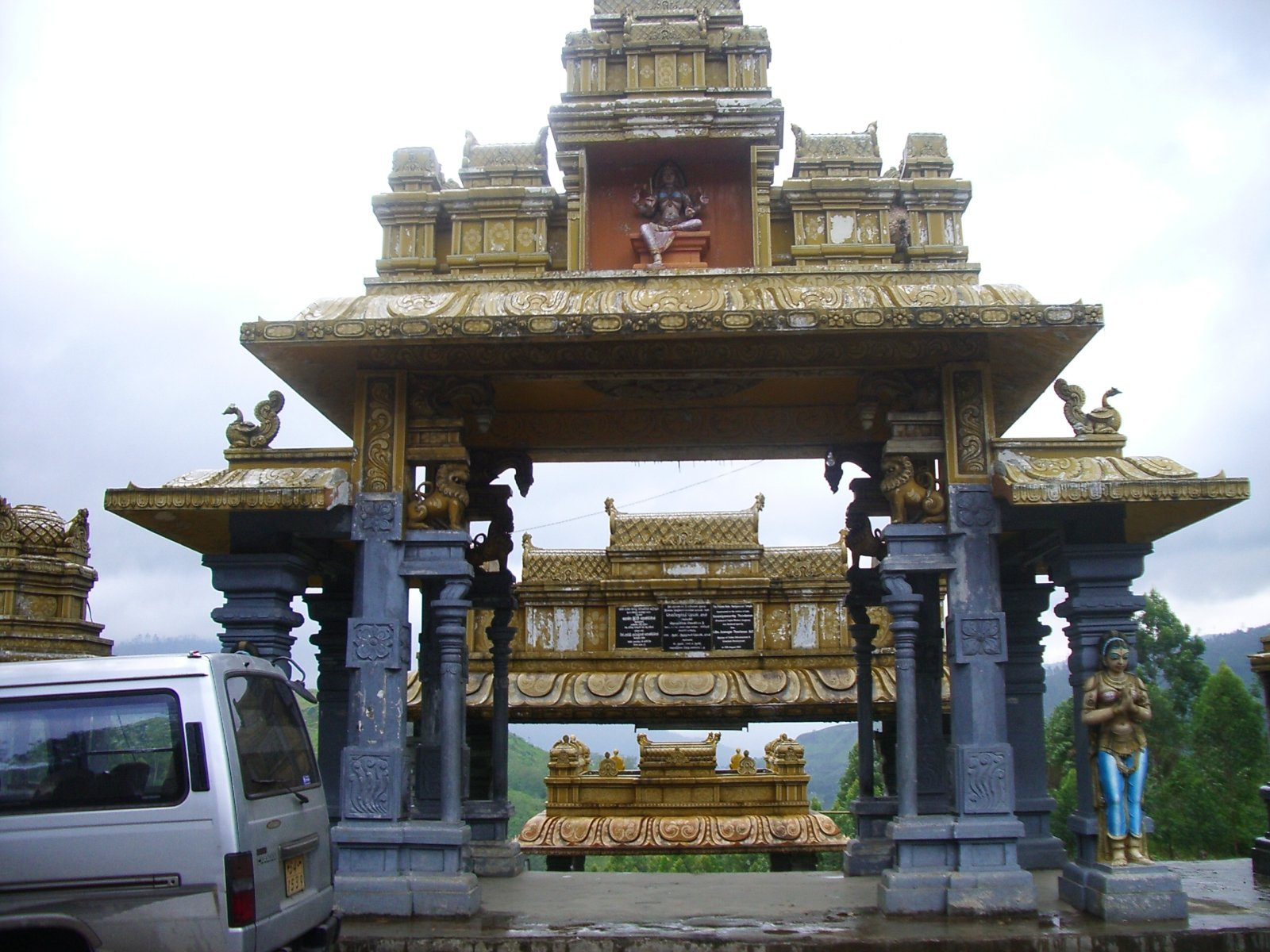 Temple hindu al centre-oest de Sri Lanka; foto feta per J. Ollé el juliol del 2006.